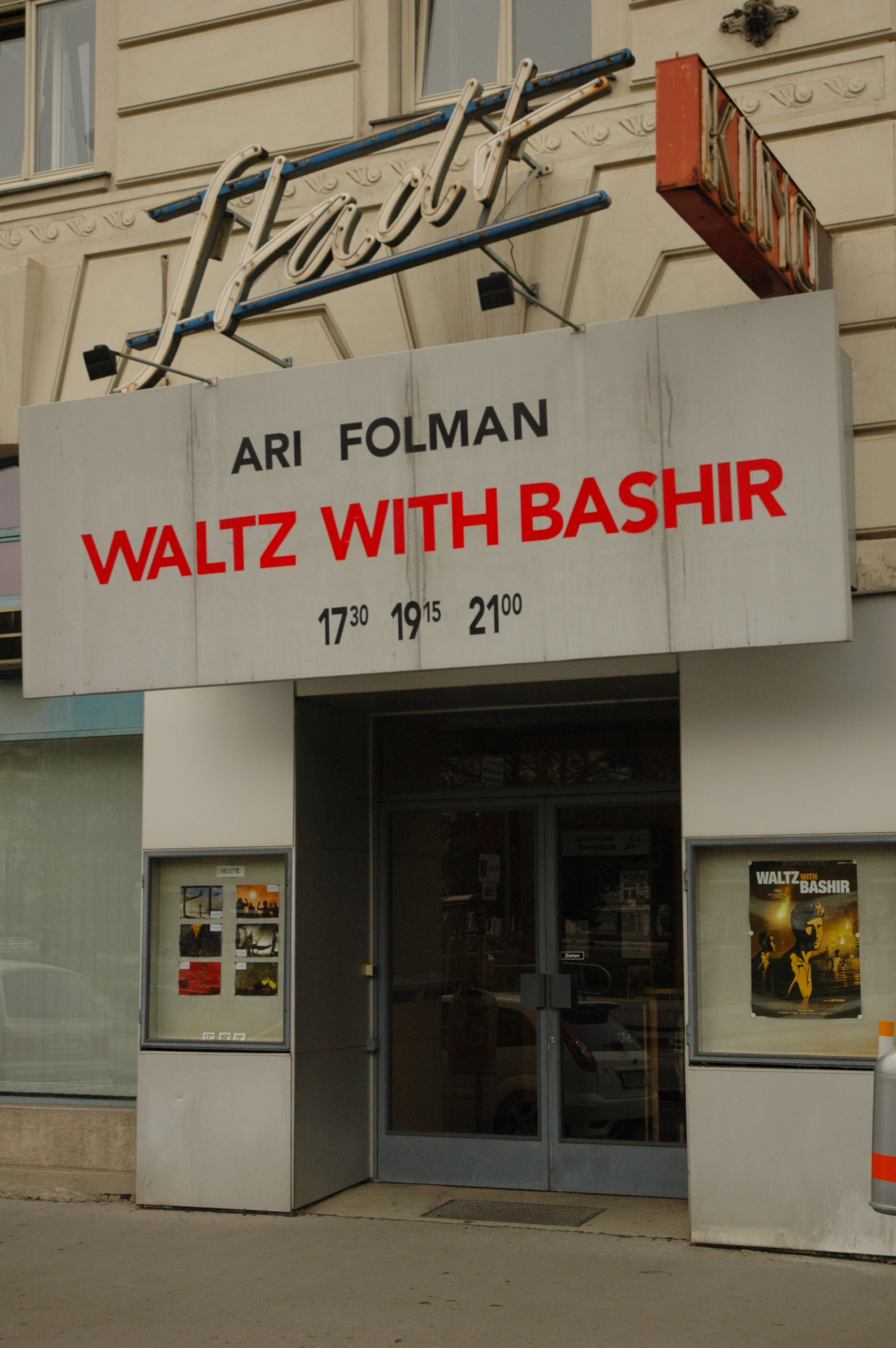 Das Wiener Stadtkino mit Programmhinweis "Waltz with Bashir" von Regisseur Ari Folman